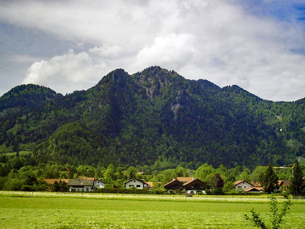 Brauneck